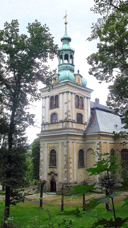 Kamienna Góra, Kościół Matki Bożej Różańcowej - 6.08.2012 r.